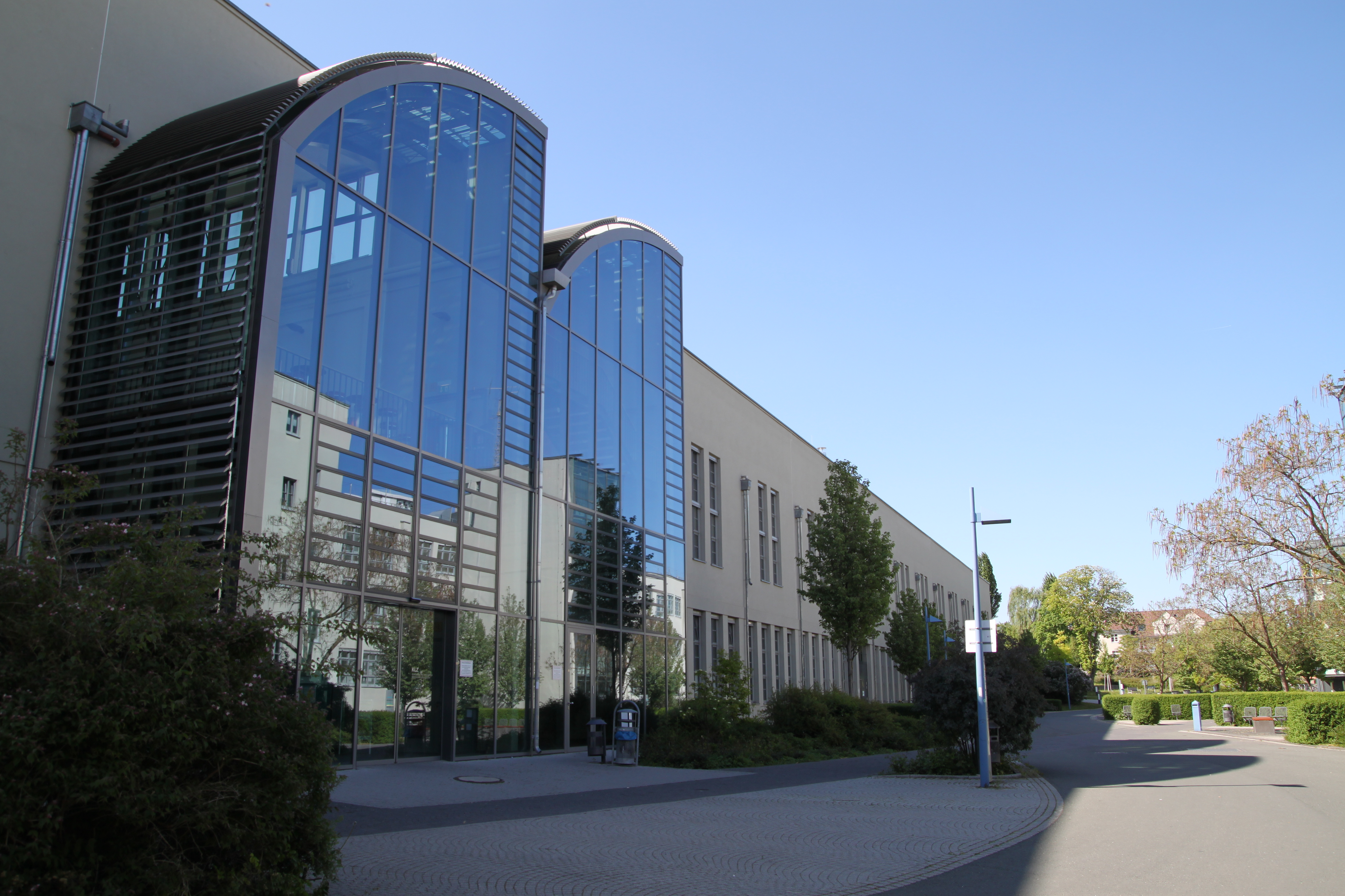 Jena FH Haus 4